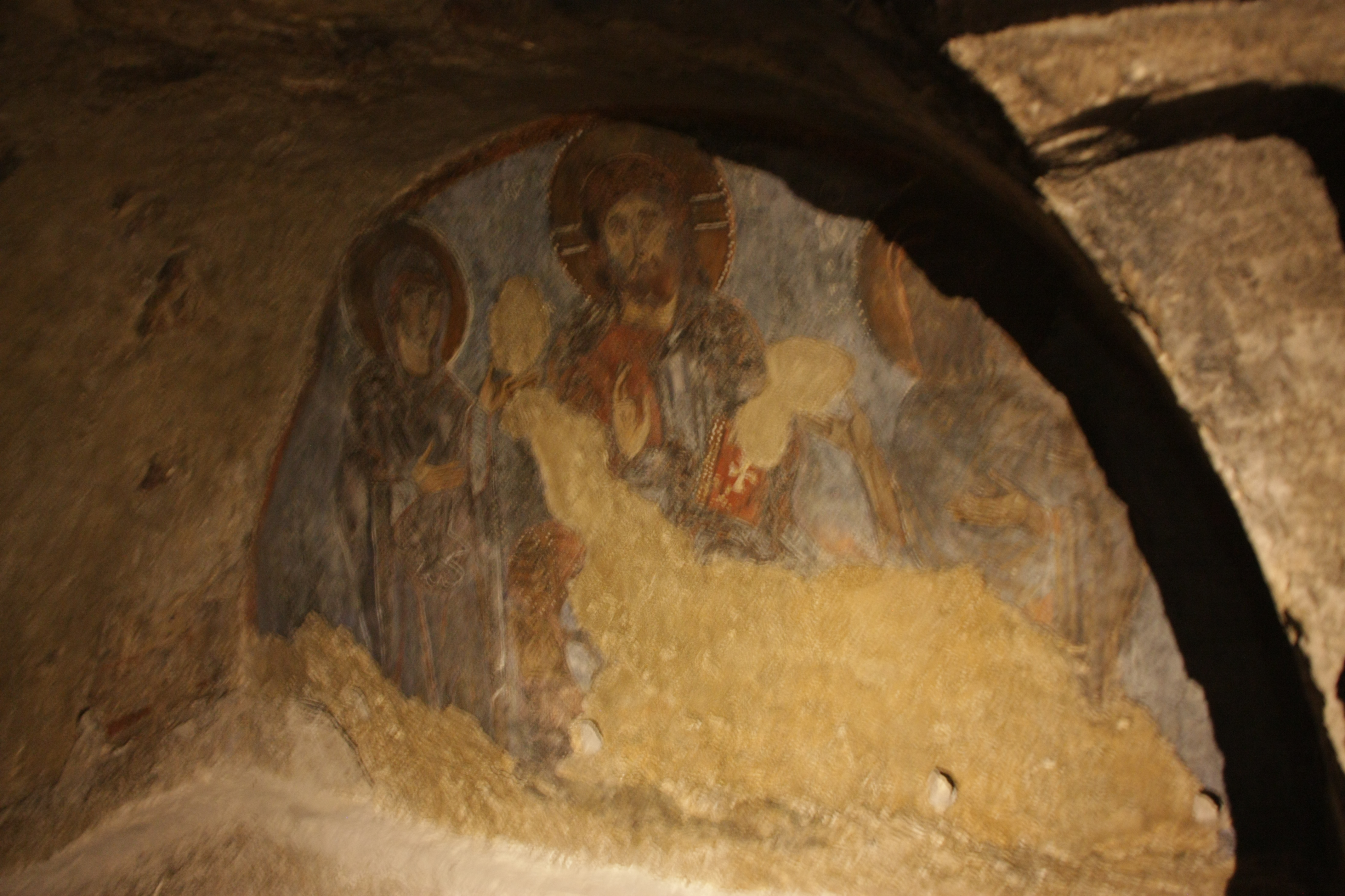 Santa Maria la Cava e Sant'Alfio (Lentini)